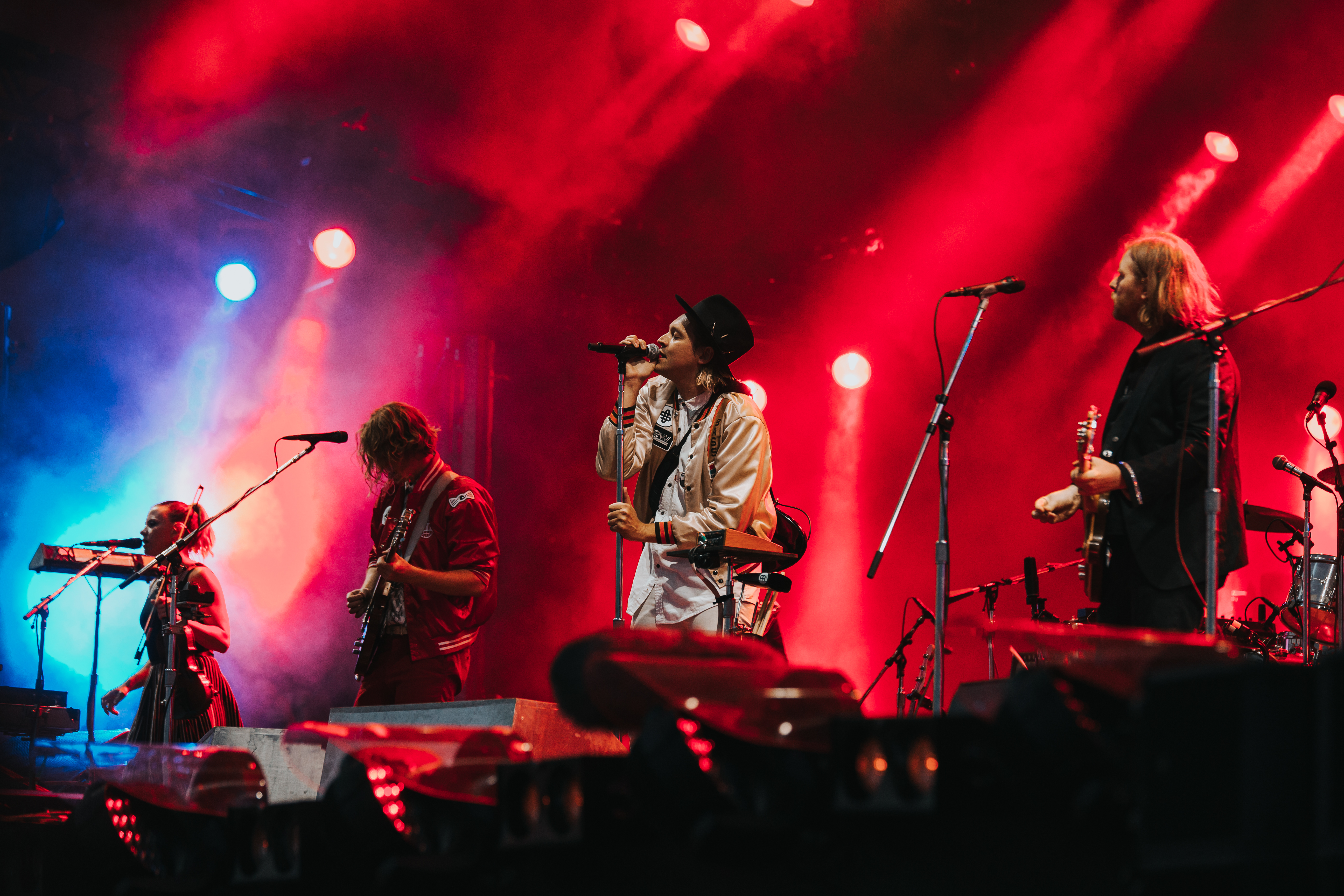 Photo: Krists Luhaers // @Kristsll